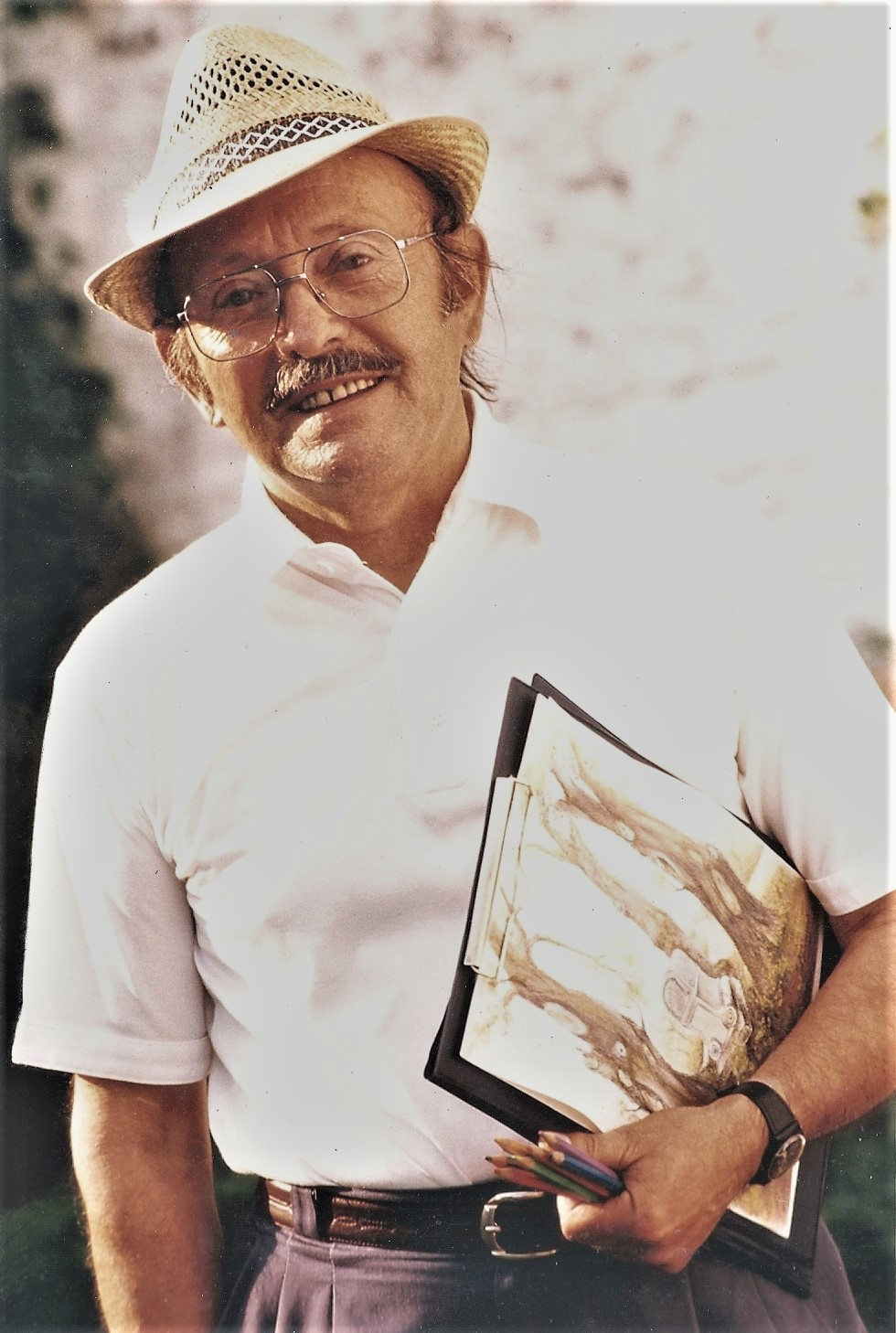 Cette photo a été publiée en octobre 1995 dans le numéro 93 du magazine Notre Temps, à la page 116, lorsque Marcel a reçu le prix "Art et Culture" de la Fondation Notre Temps pour son livre illustré "Chasse aux vieilles Censes dans le Centre".